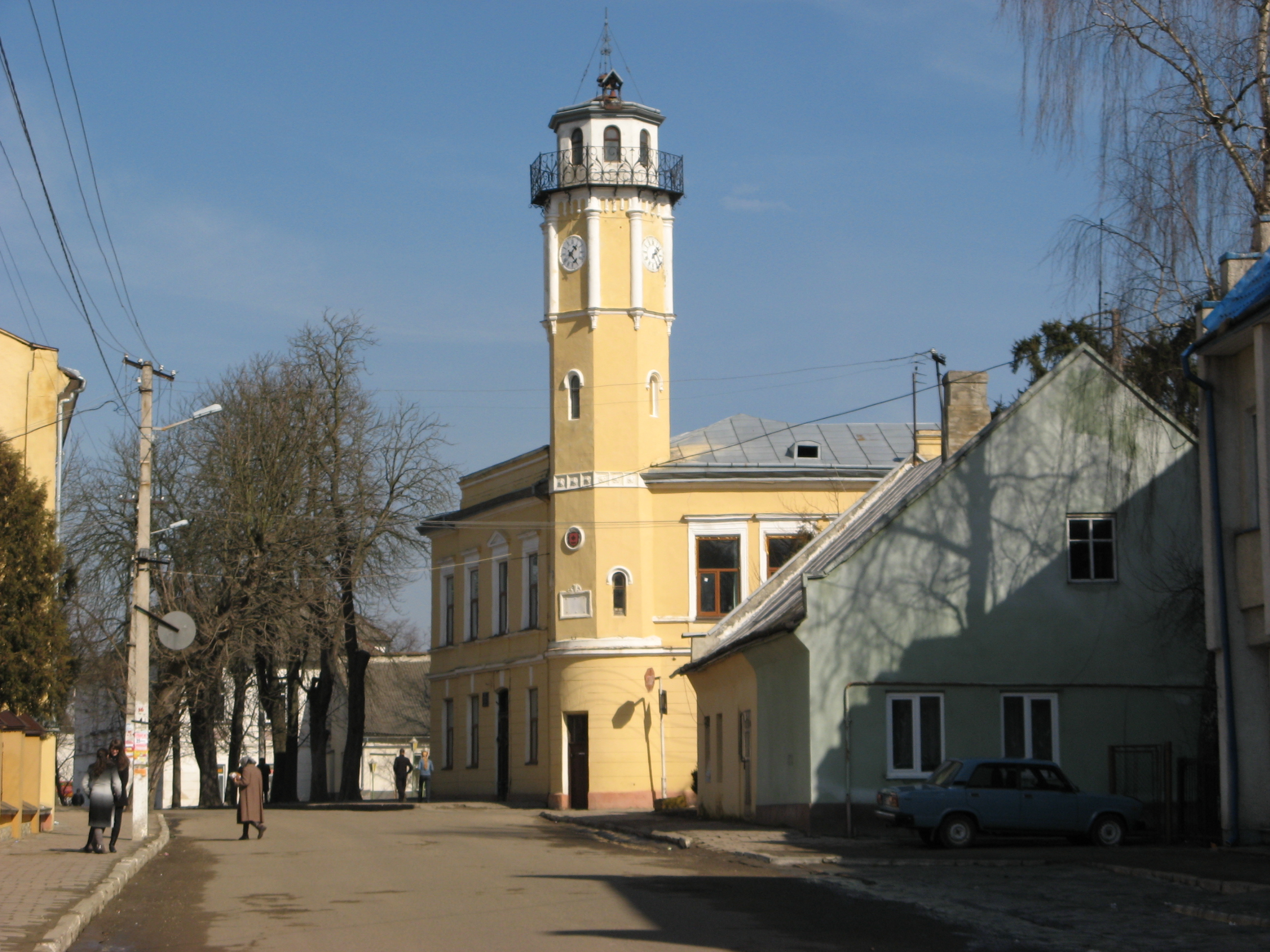 Javoriv-ratusha-7.jpg: Яворівська ратуша